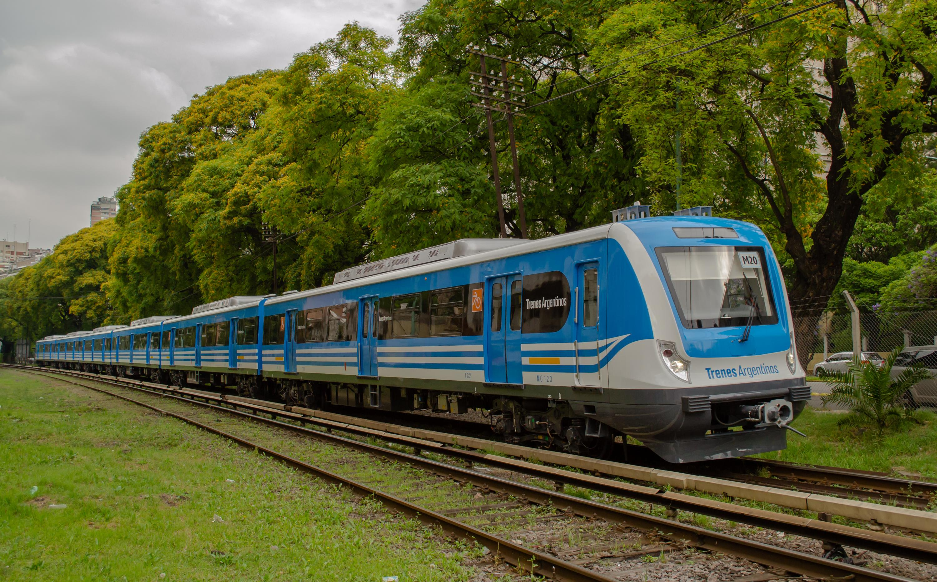 Unidad de tren eléctrico CSR pasando por Barrancas de Belgrano, rumbo a Tigre, a pocas horas de su entrada en servicio.